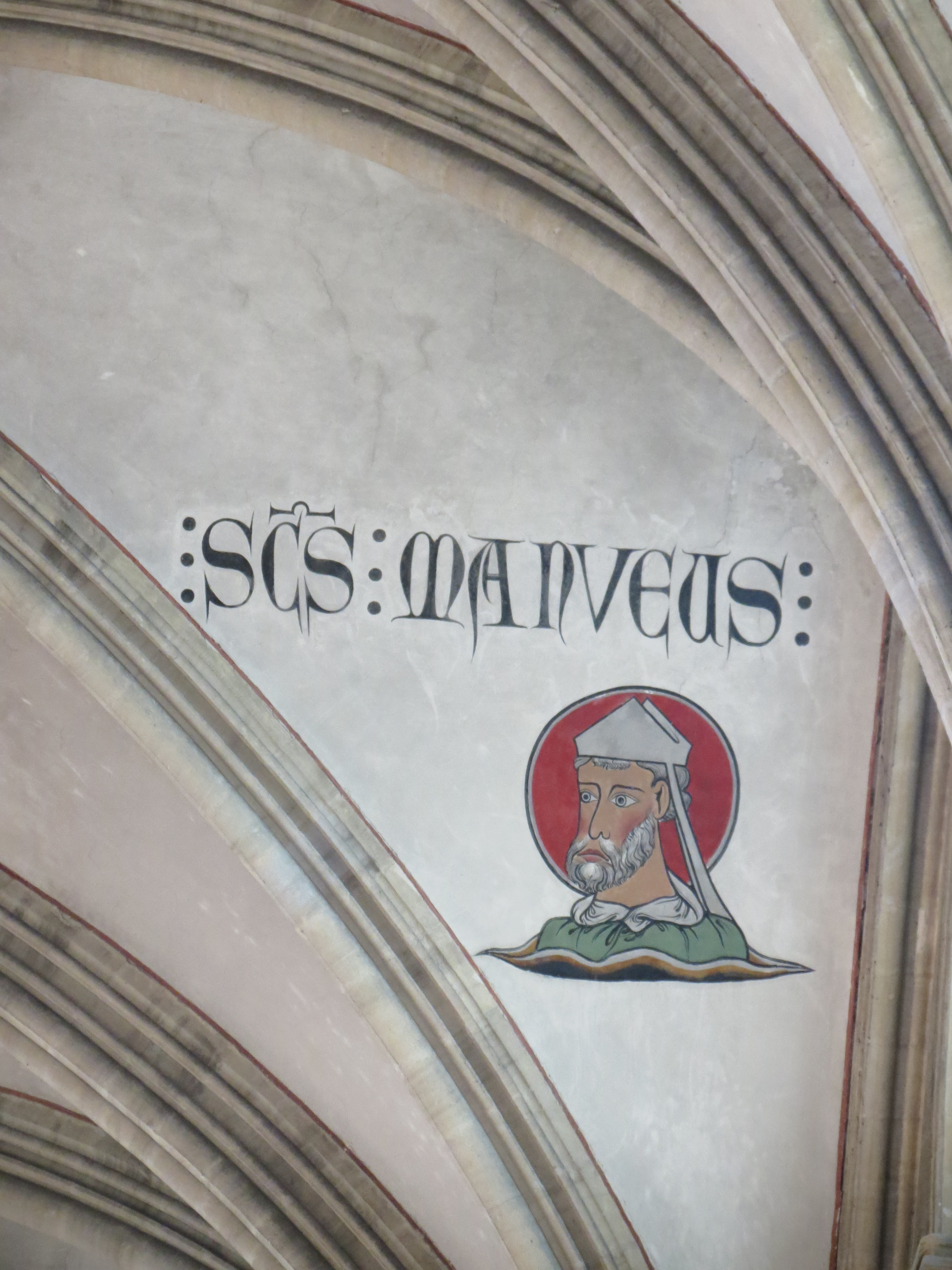 Peinture de Saint-Manvieu sur une des voûtes du chœur de la cathédrale de Bayeux.